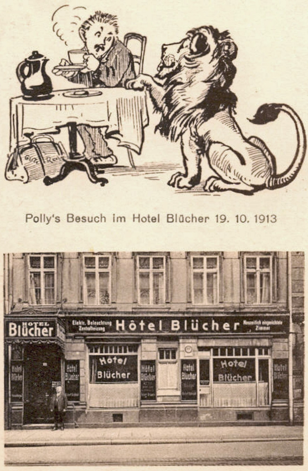 Werbepostkarte des Hotels Blücher in Leipzig bezugnehmend auf die Leipziger Löwenjagd